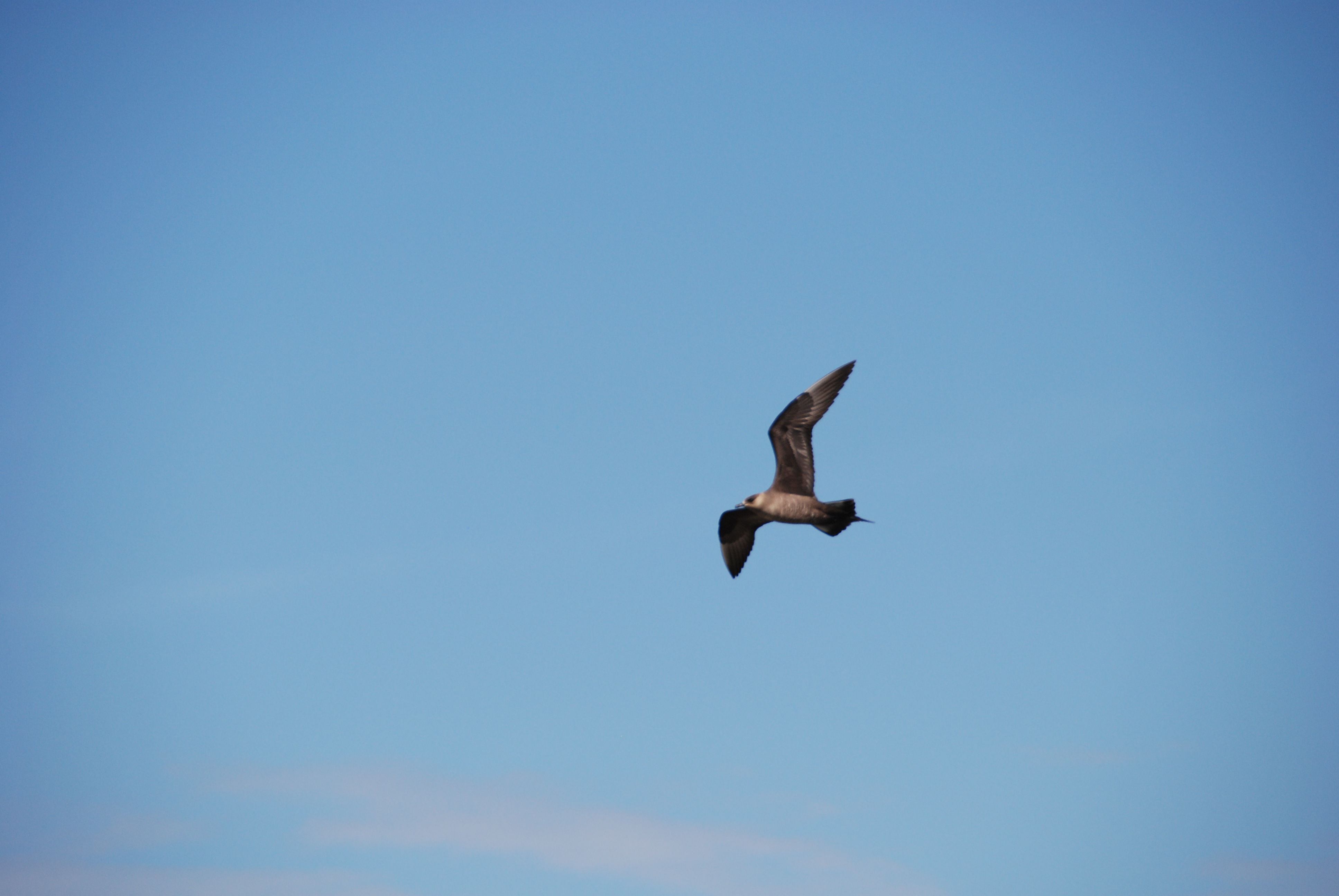 Labb på Koster i Bohuslän, adult mörk